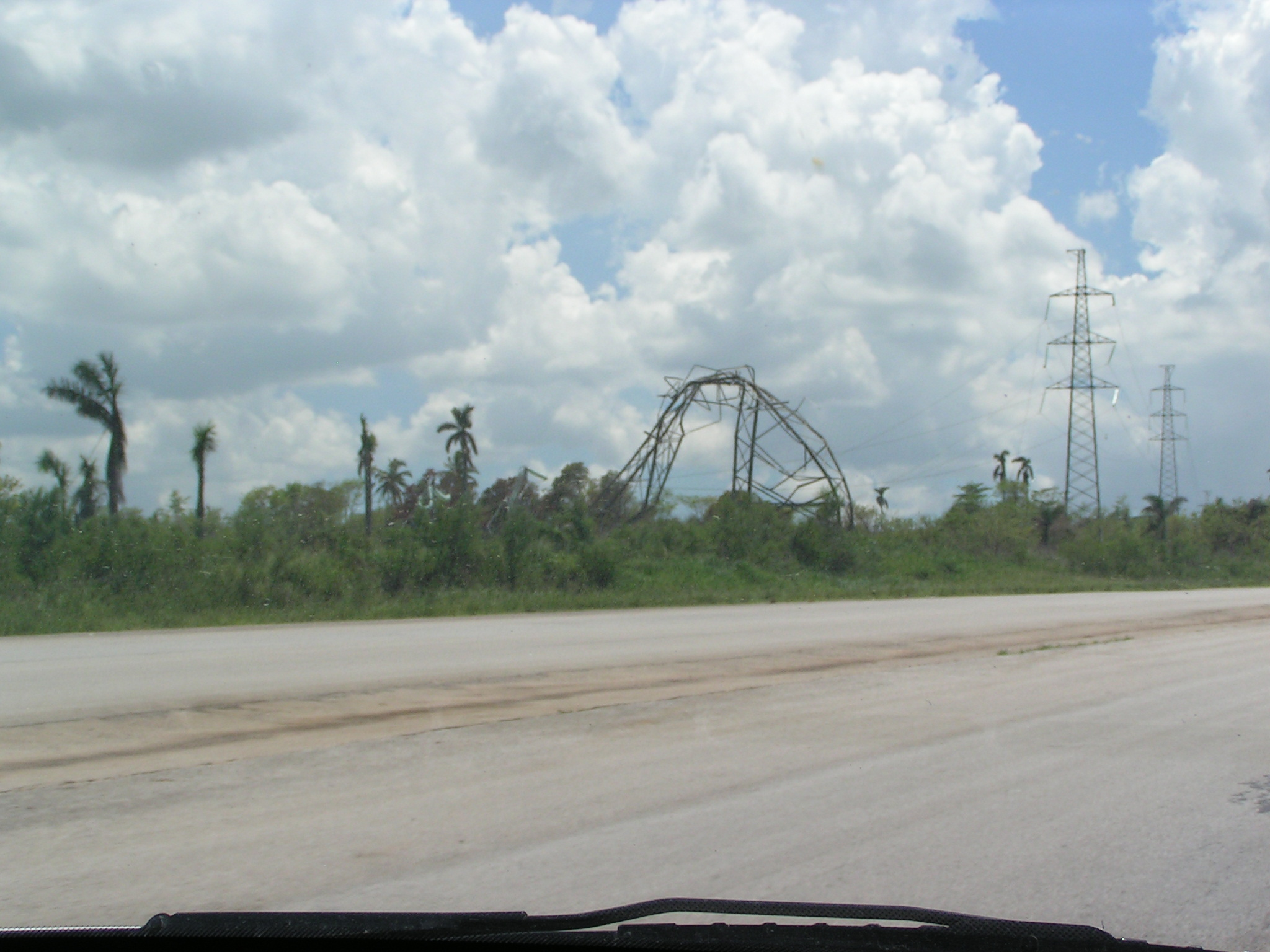 Durch Hurrikan Charly zerstörter Strommast auf Kuba, 2004, selbstfotographiert